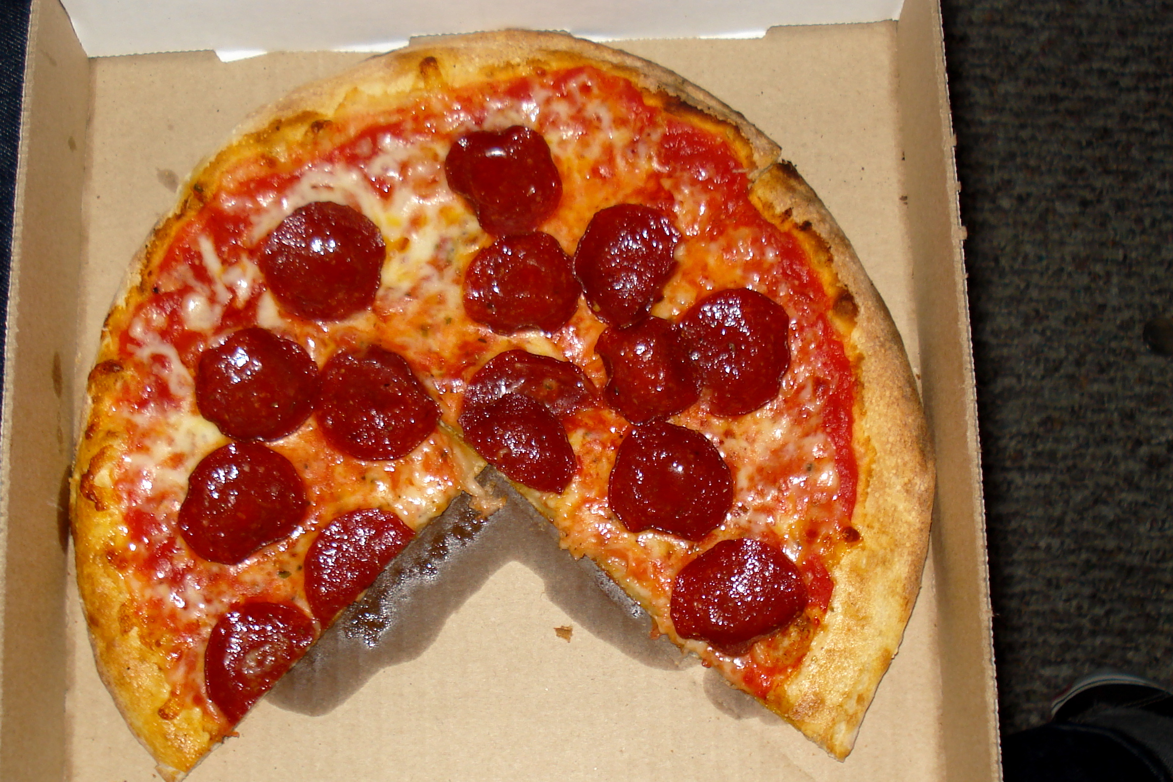 Small Pepperoni Pizza Read more about Via Via IV and Providence pizza at The Pizza Review .